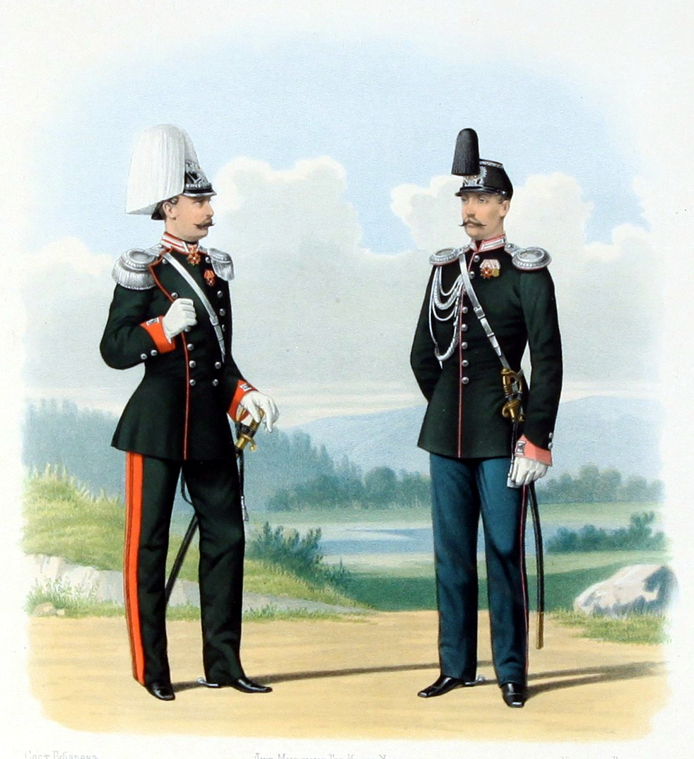 Штаб-Офицер Л. Гв. Драгунского и Обер-Офицер (Адьютант) 2 Лейб-Драгунского Псковского Ея Величества полков. (вседневные формы) 2 Января 1874.